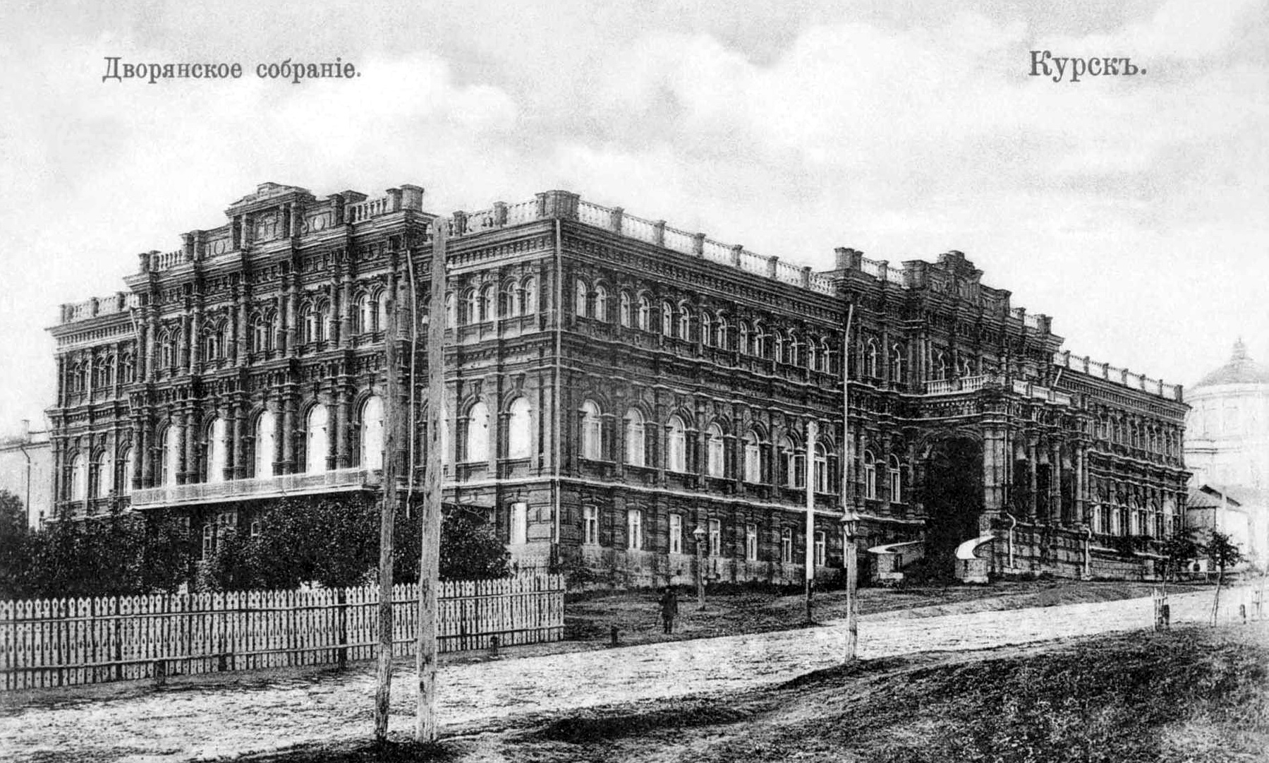 Здание Дворянского собрания в Курске до пожара 17 октября 1892 г.: подъезд иной, нежели после реставрации.